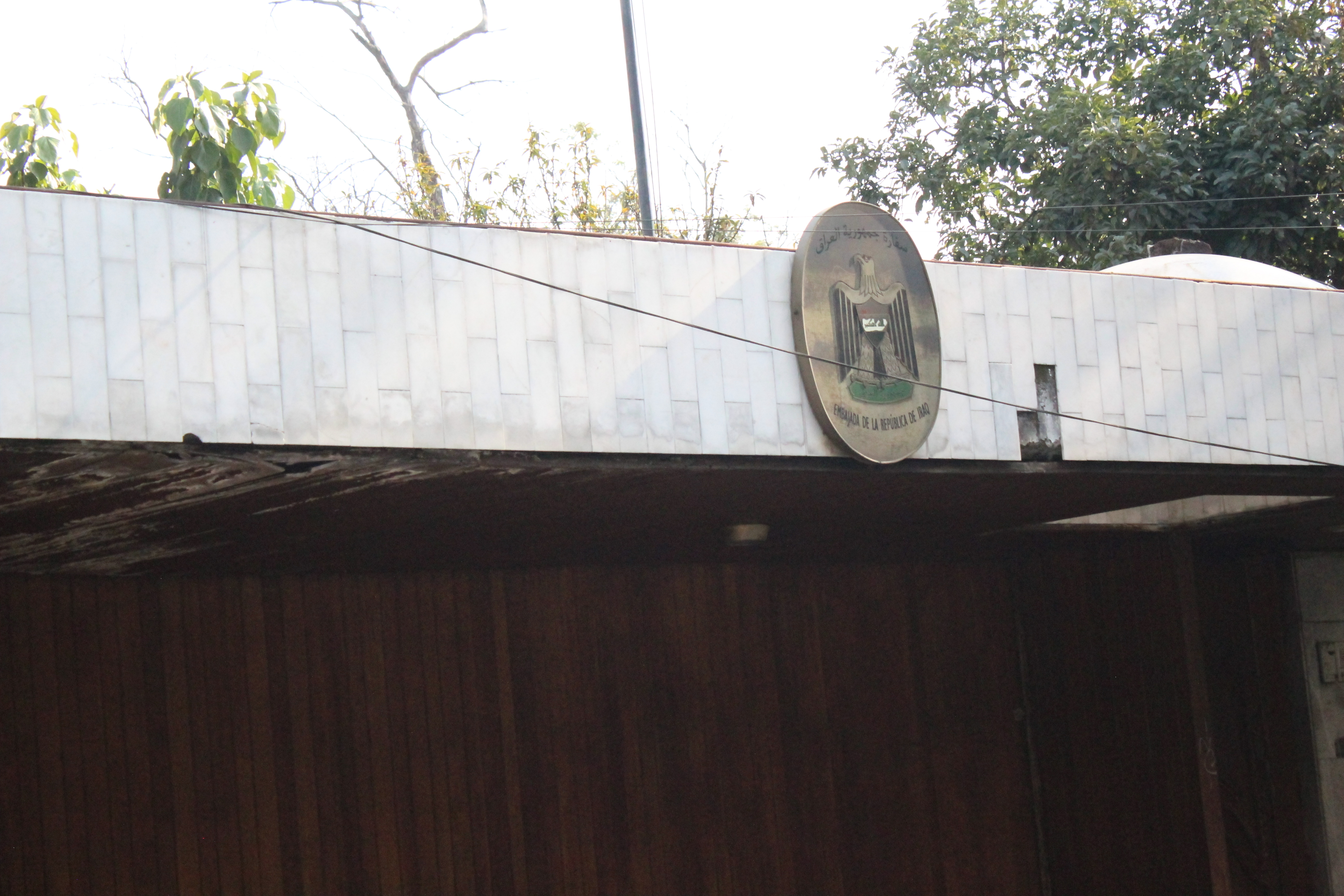 Entrada a la Embajada de Irak en México, con el escudo, la puerta, y la cerca eléctrica.